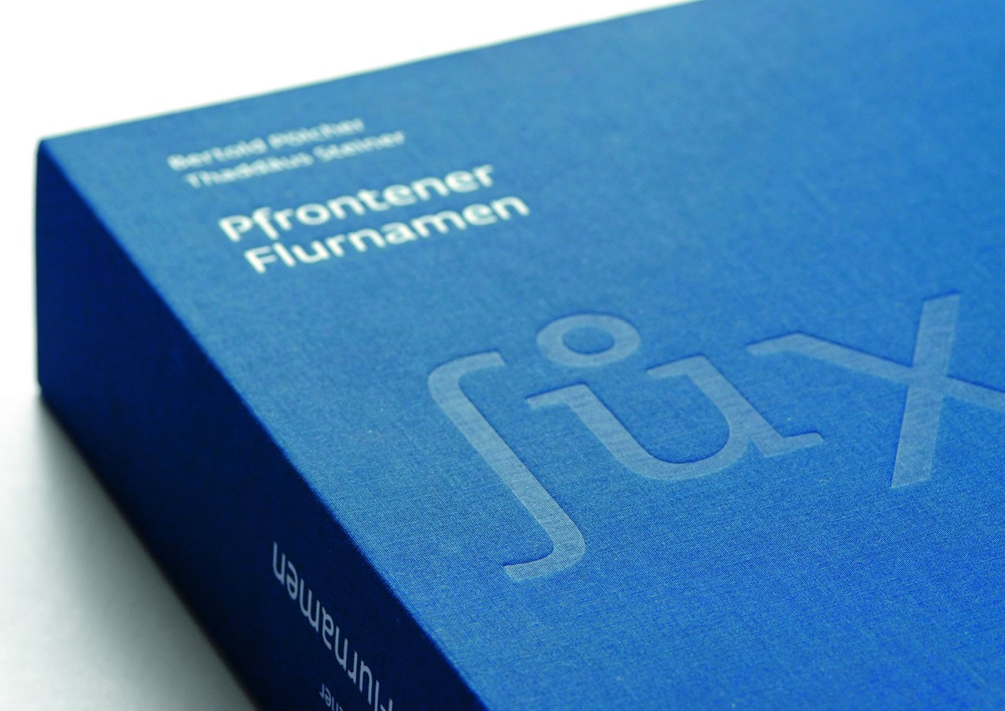 Titelseite des Buches Pfrontener Flurnamen, gestaltet von der designgruppe Koop